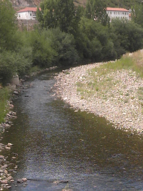 Río Bernesga a su paso por Santa Lucía de Gordón. Estiaje de agosto Autor: Santiago Pastrana